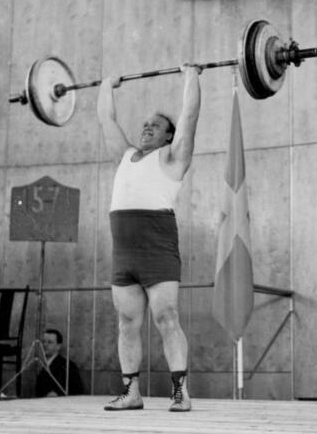 Lage Andersson